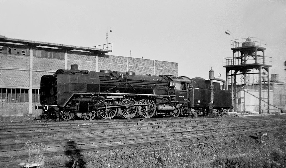 01 2118 nach ihrer letzten Fahrt in Arnstadt.